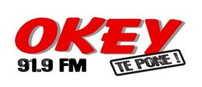 Logo de la peruana limeña Radio Okey 91.9 FM.